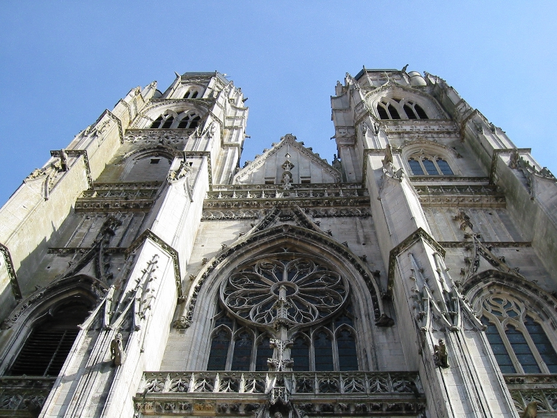 Description: Basilique de Saint-Nicolas-de-Port, en Lorraine - façade en contre plongée Auteur: François BERNARDIN